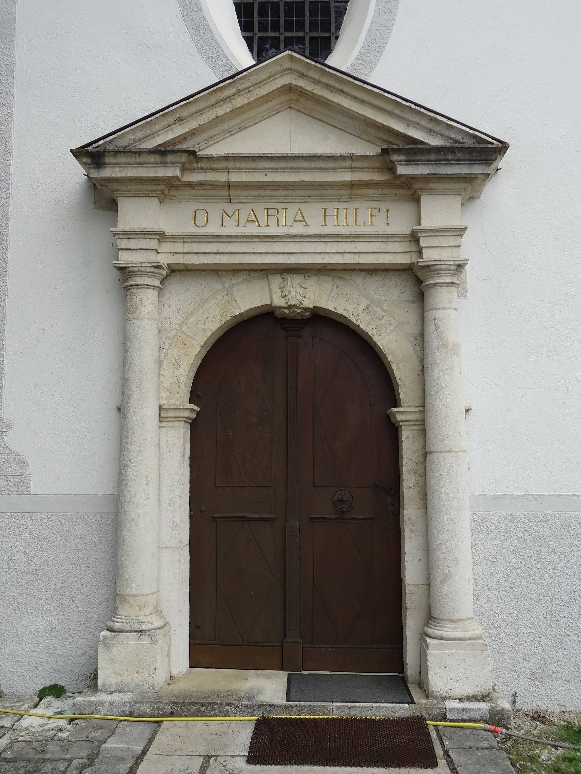 Wallfahrtskirche Mariä Himmelfahrt in Allersdorf (Stadt Abensberg)ː Südportal